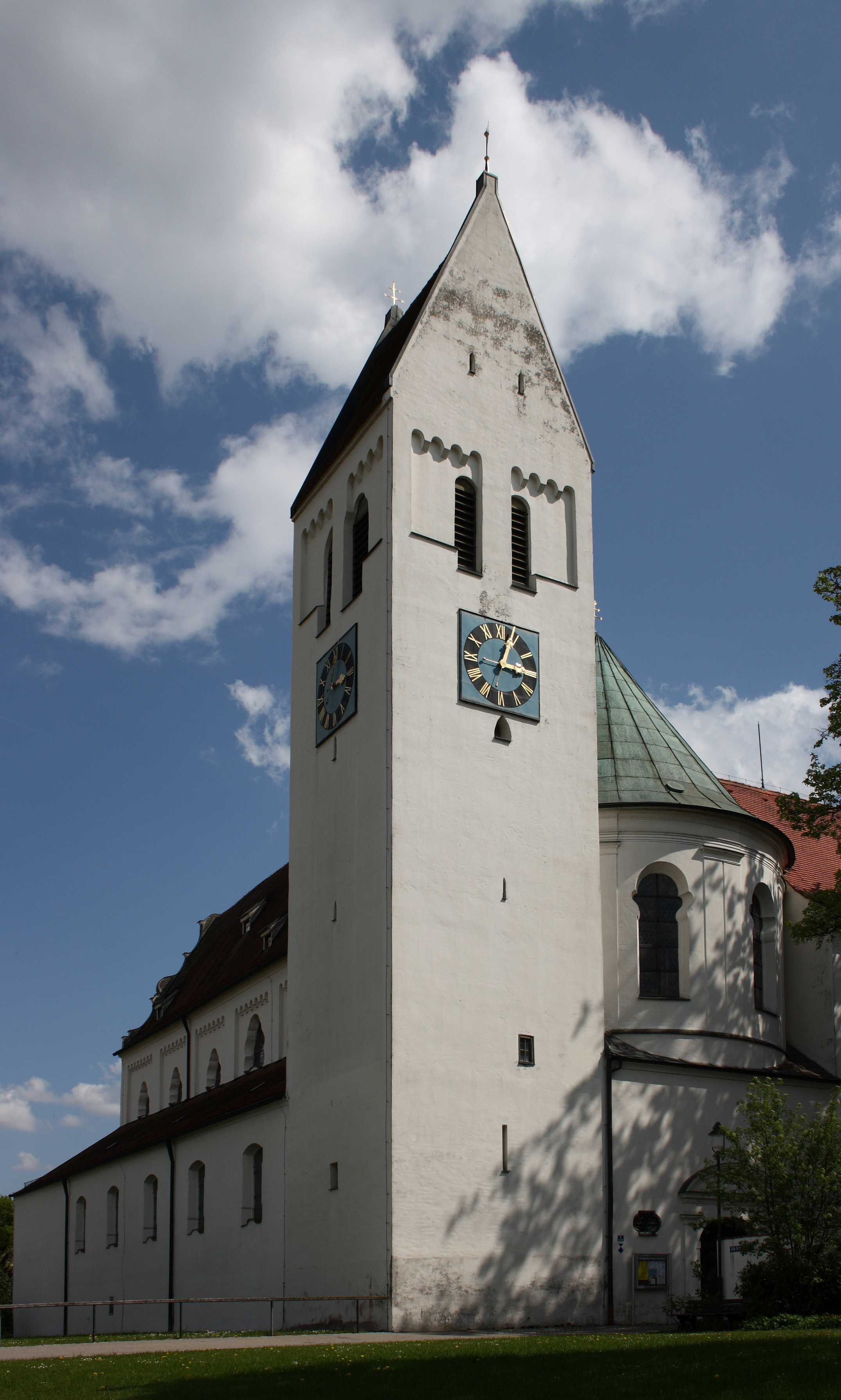 Katholische Pfarrkirche St. Peter und Paul (ehemalige Abteikirche des Klosters Thierhaupten) in Thierhaupten, einer Gemeinde im Landkreis Augsburg, Ansicht von Westen